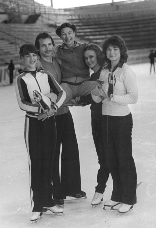 Eiskunstläufer, DDR ADN-ZB Deutsche Demokratische Republik-28.4.1982 Jutta Müller feierte 25jähriges Trainer-Jubiläum. Ihr 25jähriges Trainer-Jubiläum im Eiskunstlaufsport feierte Mitte April 1982 Jutta Müller (M.) aus Karl-Marx-Stadt. Von ihr betreute Sportler eroberten seit 1966 insgesamt 40 Medaillen bei Olympischen Winterspielen sowie Welt- und Europameisterschaften. Das Foto zeigt sie mit vier ihrer erfolgreichsten Schützlinge, die ihr in der Karl-Marx-Städter Eissporthalle gratulierten und sich herzlich bedankten: Olympiasiegerin und Weltmeisterin Anett Pötzsch (r.), Weltmeister Jan Hoffmann, ihre Tochter, Weltmeisterin Gaby Messerschmidt-Seyfert (2.v.r.) und Katarina Witt. Vize-Weltmeisterin und Europameisterschafts-Zweite 1982 (l.). Reporter: Oberst Copyright: ADN-Zentralbild Berlin-DDR